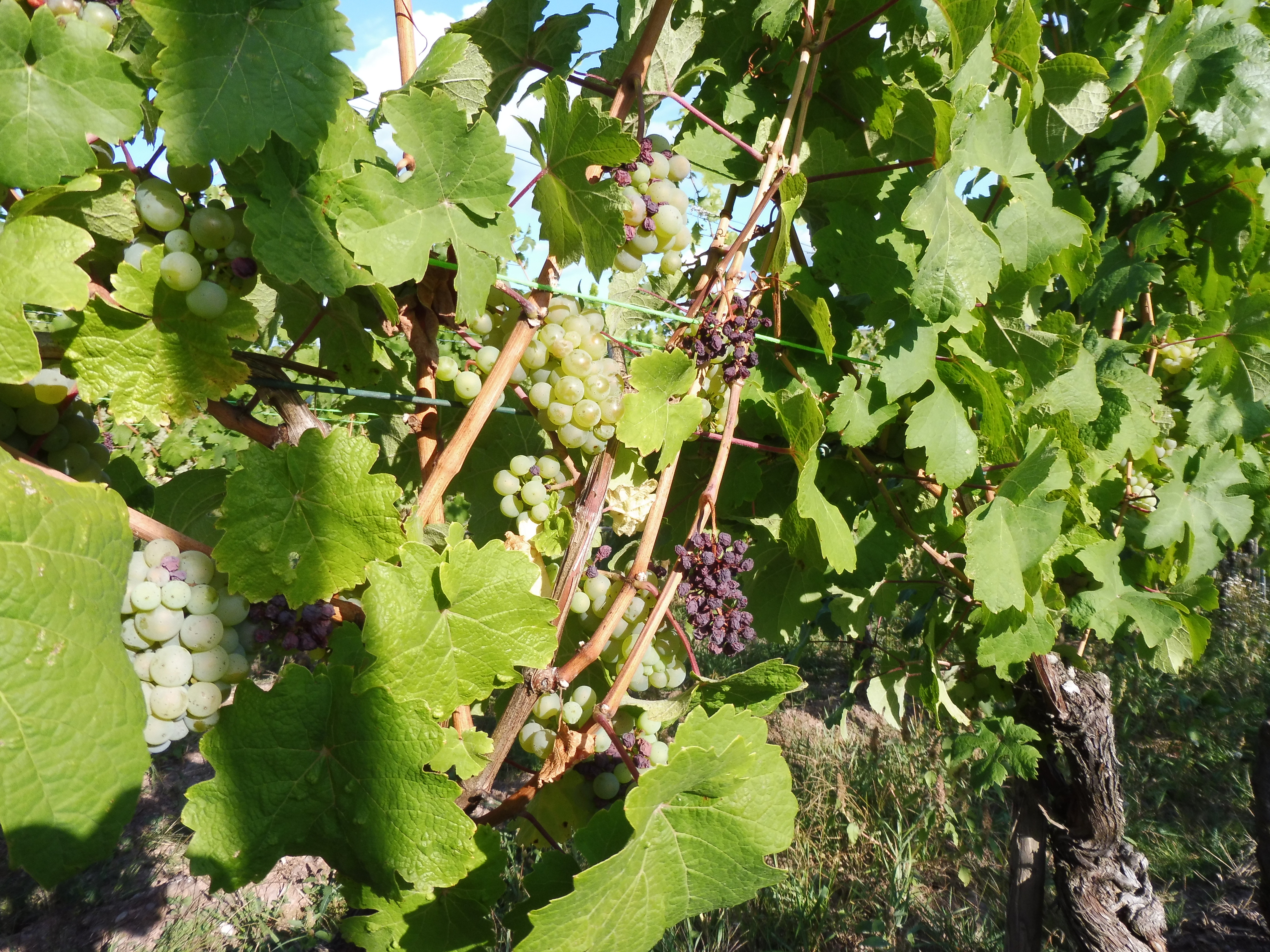 Von Sonnenbrand befallene Rieslingrebe